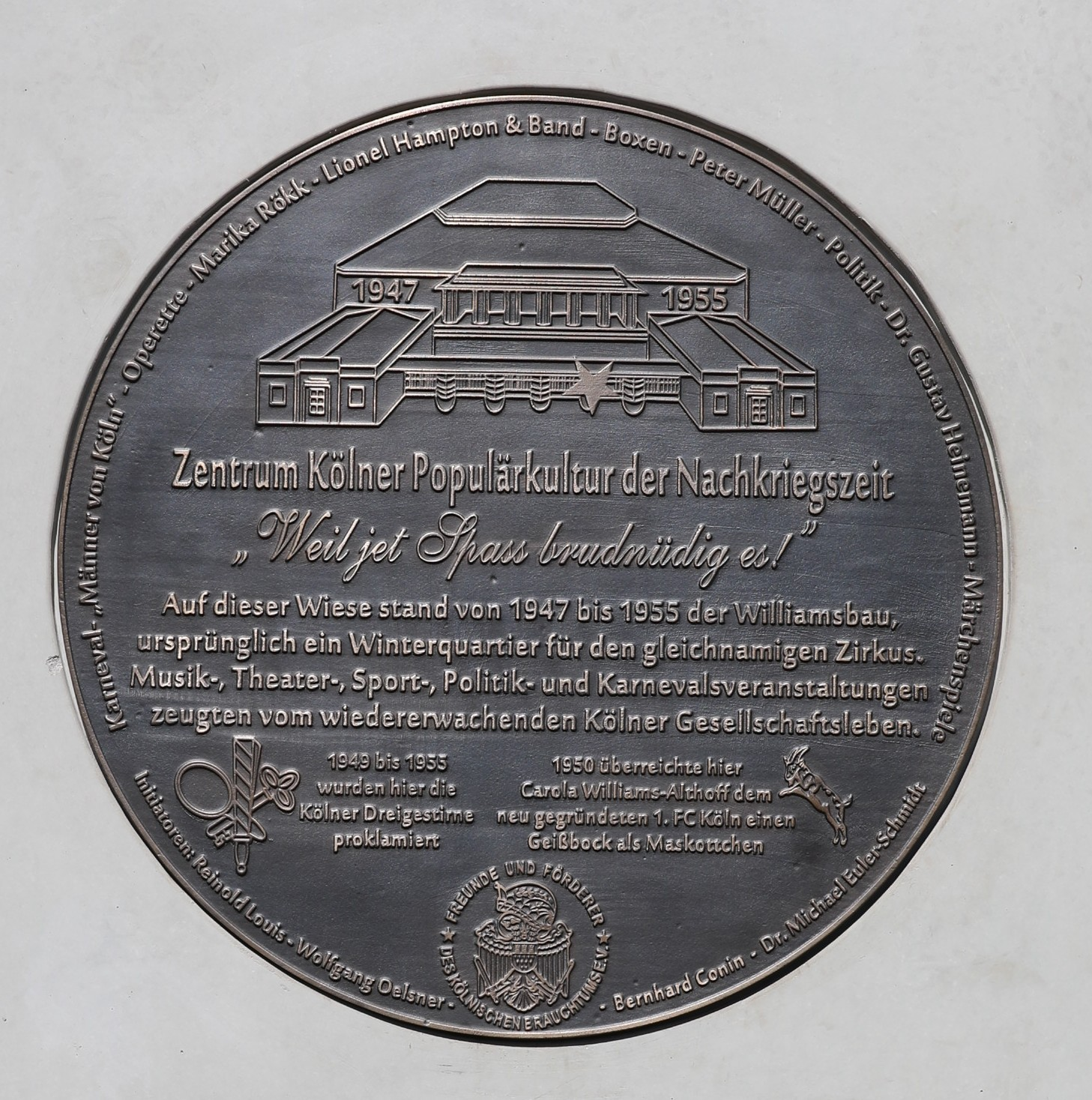 Bronzeplakette zur Erinnerung an den ehemaligen Standort des Williamsbaus in Köln am Inneren Grüngürtel